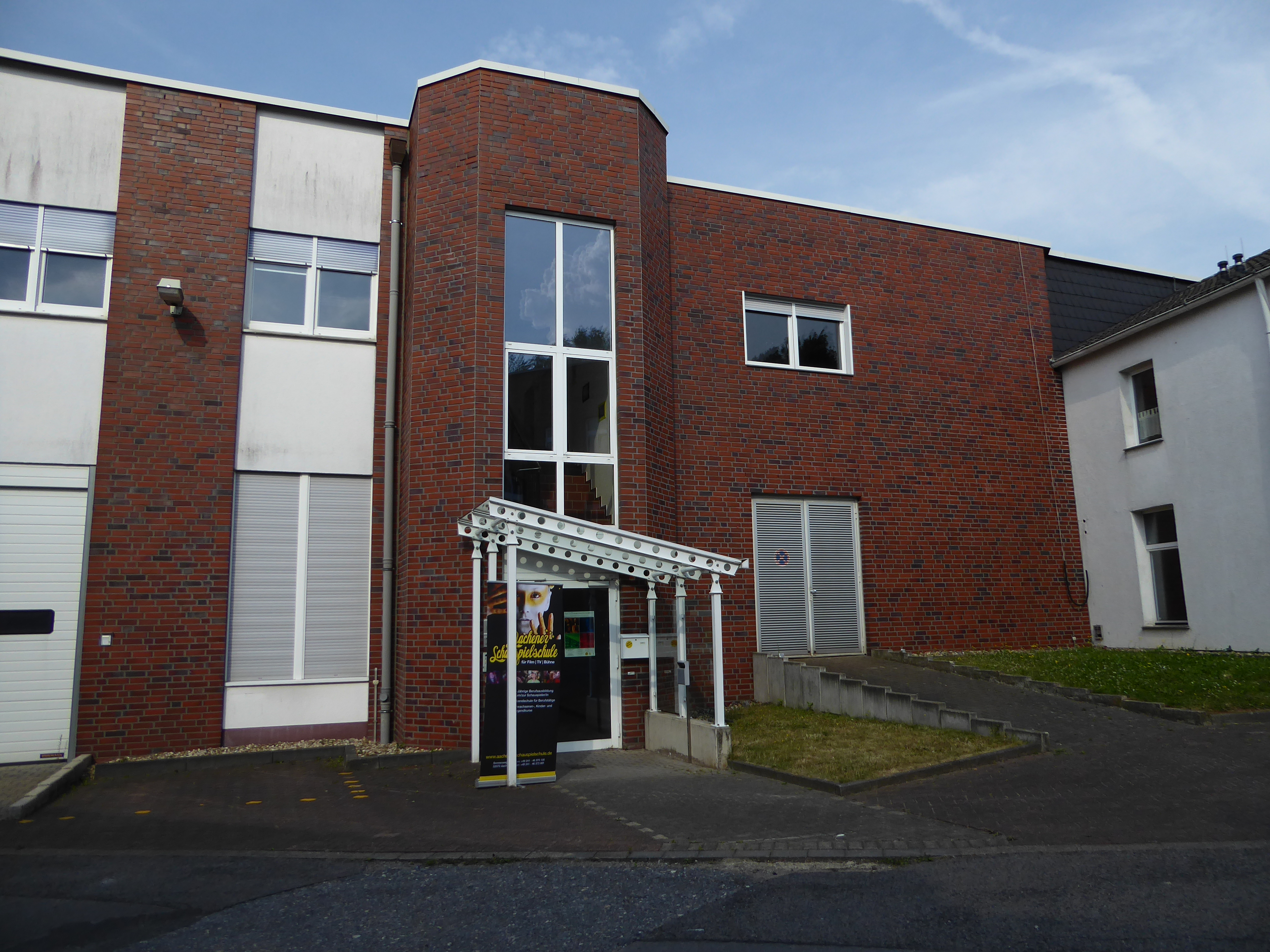 Eingang der Schule in Aachen